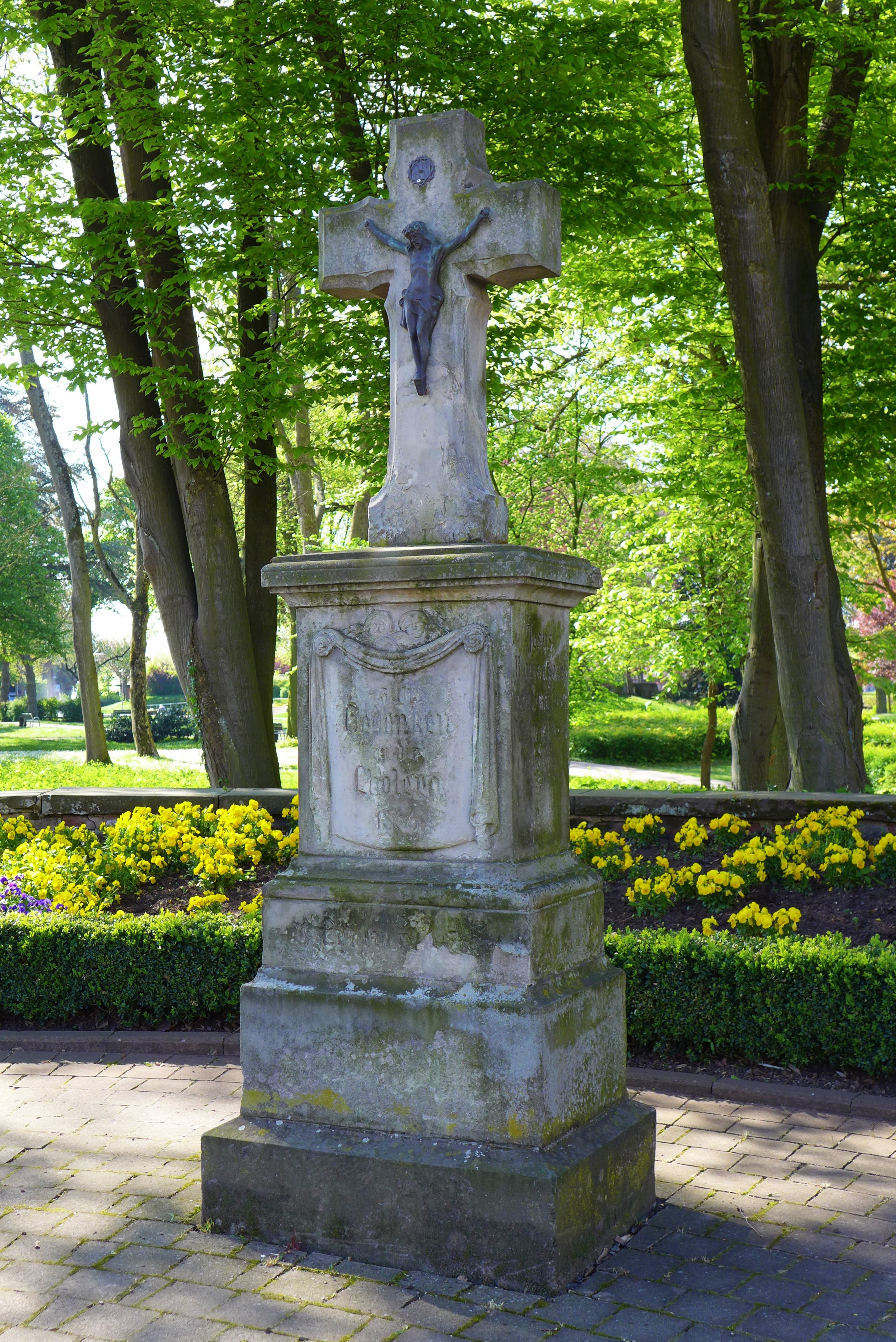 Dillingen/Saar, Cholerakreuz von 1866 am Stadtpark